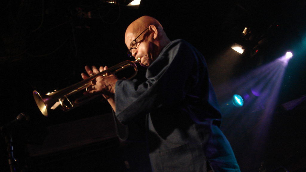 Eddie Henderson, trumpet player, 2007